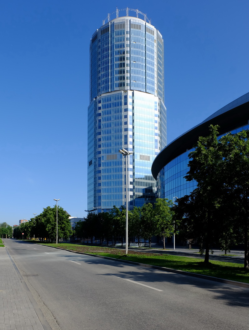 Высотный деловой дом "Демидов" в Екатеринбурге